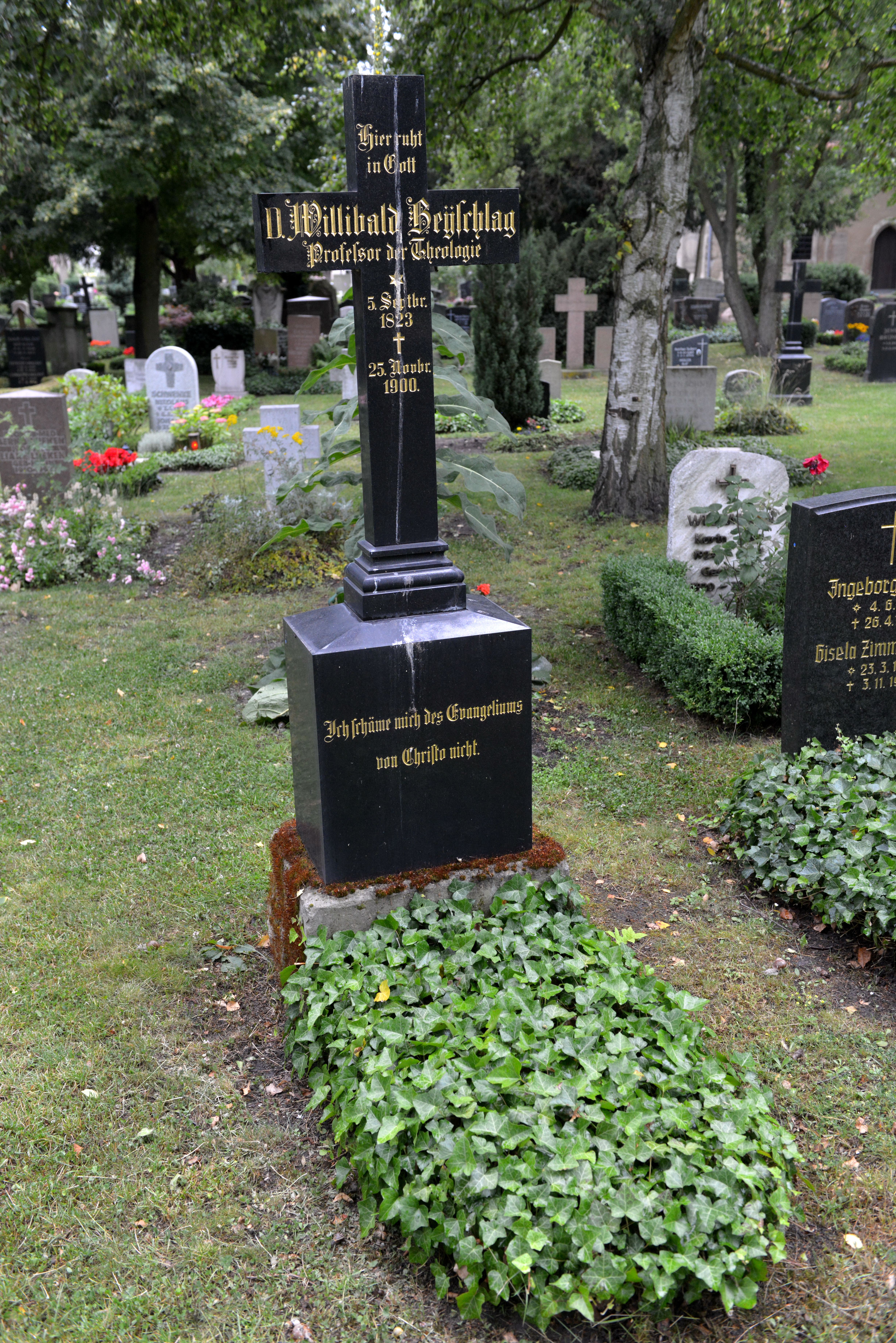 Laurentiusfriedhof Halle/Saale, Grab des Theologen Willibald Beyschlag (1823-1900) The making of this document was supported by the Community-Budget of Wikimedia Germany.